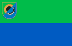 Прапор Приазовського району Запорізької області України